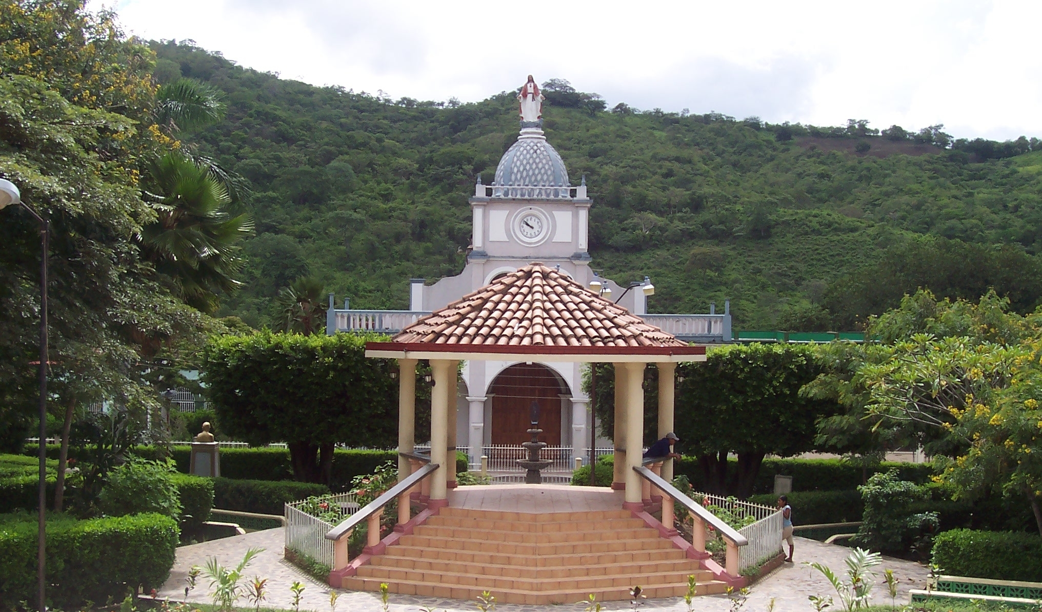 Kiosko ubicado en el parque del pueblo de Telpaneca. Desde esta perspectiva se puede observar la belleza del estilo colonial de la Iglesia.